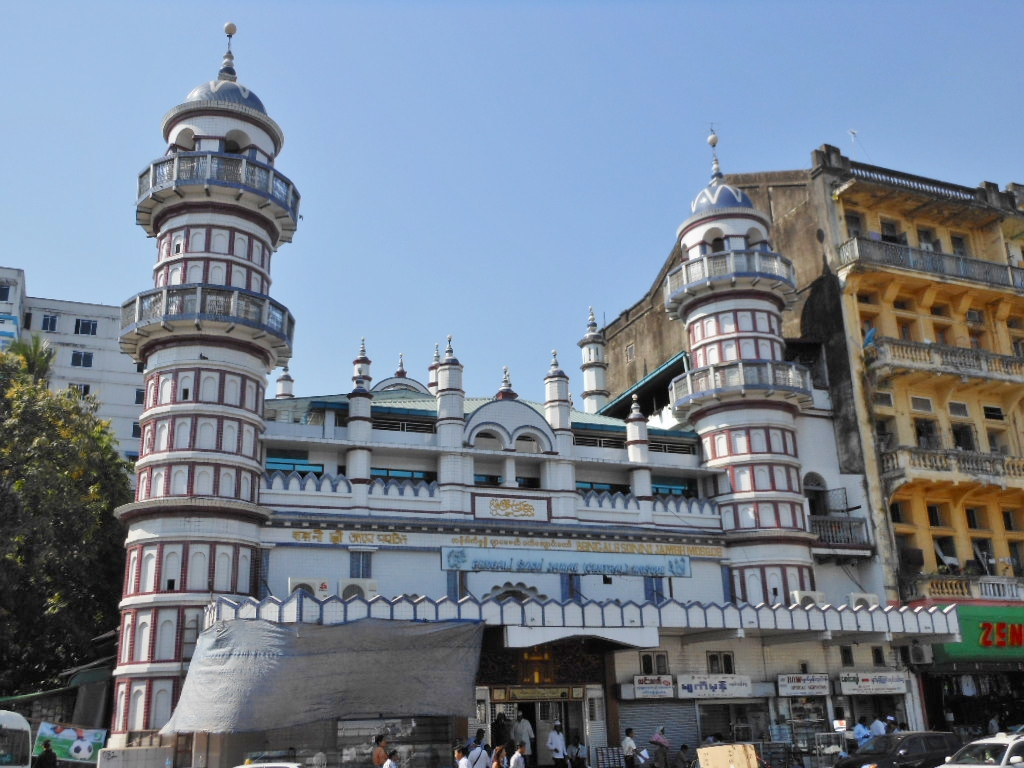 Yangon Mosque